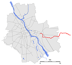 Kanał Wawerski (czerwona linia) na tle konturu Warszawy. Mapka wykonana przy pomocy programu GMT 5.1.1